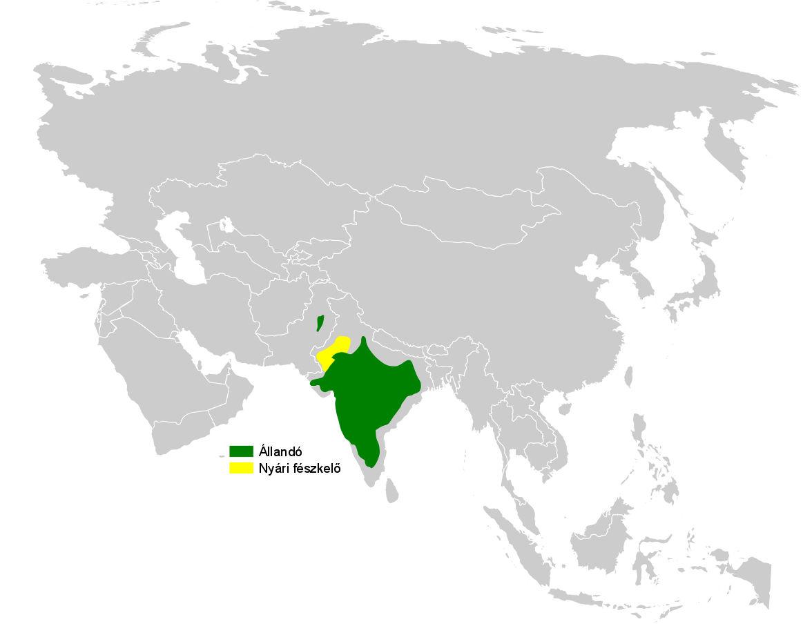 Ammomanes phoenicura distribution map, based on